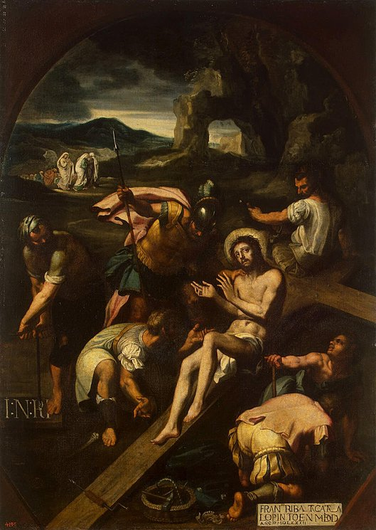 Franciso Ribalta, Preparativos para la crucifixión, óleo sobre lienzo, 144 x 103 cm. San Petesburgo, Museo del Hermitage